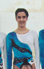 Marta Aberturas en el Gimnasio Moscardó (Madrid) en 1991.